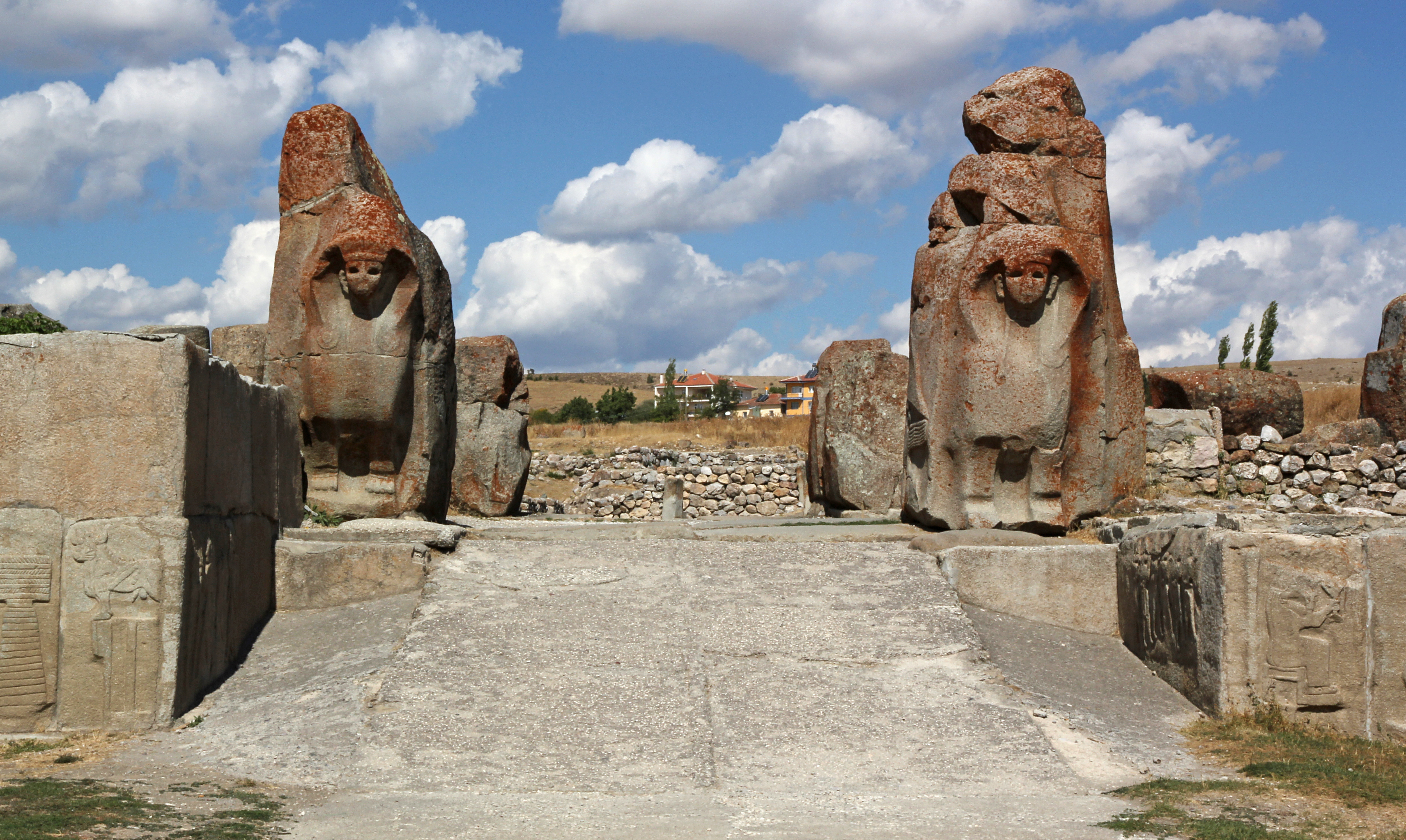 Alaca Höyük, Siedlungshügel in Zentralanatolien, Eingang mit zwei Sphinx-Skulpturen - Die Sphingen sind Repliken, die Originale stehen im Museum für anatolische Zivilisationen in Ankara